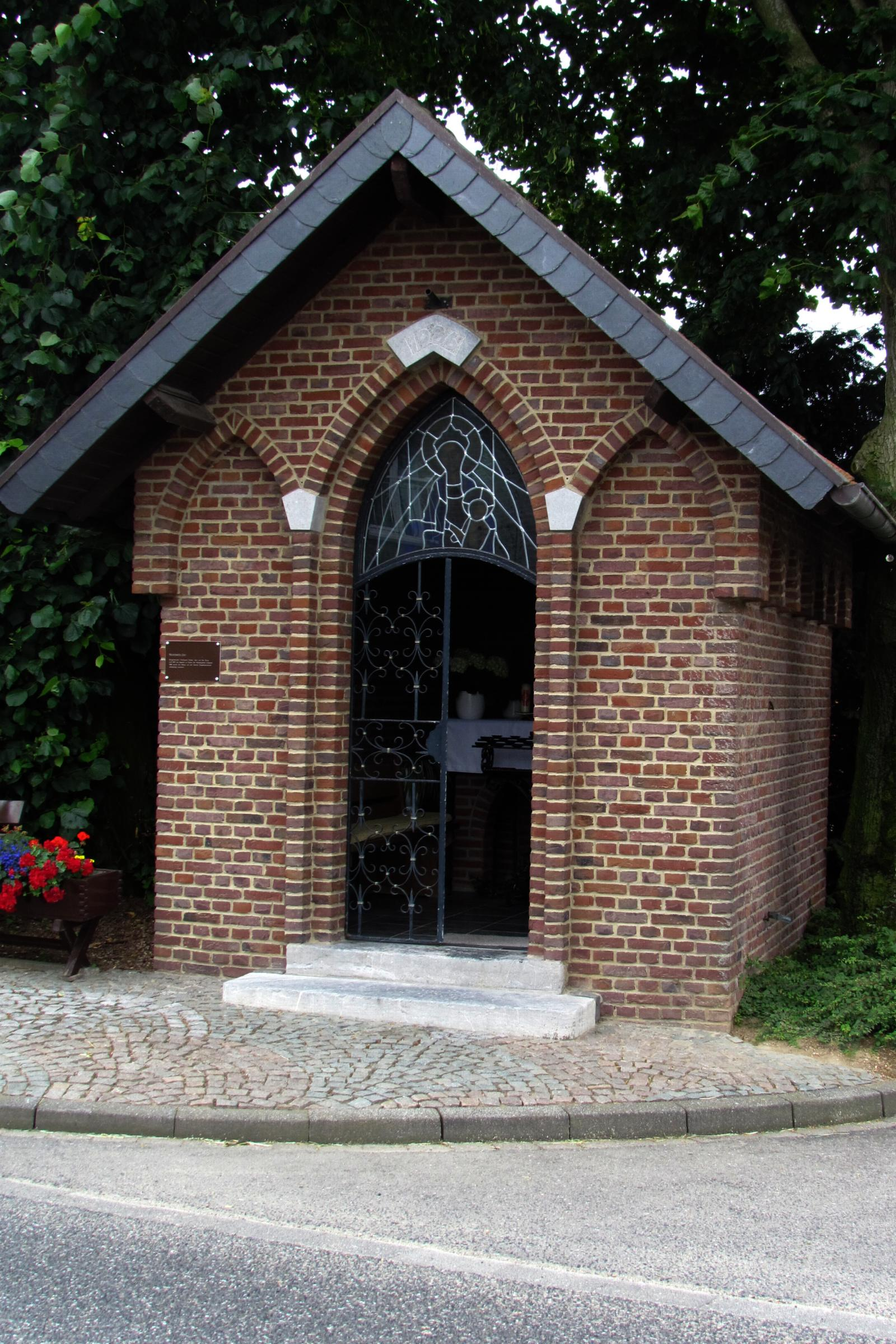 Kirchen und Kapellen im Kreis Heinsberg